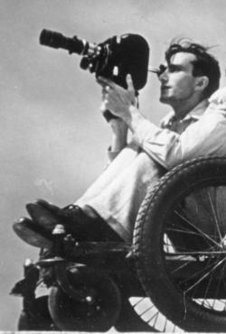 Olympiafilm-Premiere am Geburtstag des Führers . Am 20. April erlebt der von Leni Riefenstahl geschaffene grosse Olympiafilm in Berlin seine feierliche Uraufführung. Kameramann (Walter Frentz) bei der Arbeit für den Olympiafilm mit Leni Riefenstahl Scherl-Bilderdienst-Olympiafilm 14.4.38 [Herausgabe-Datum]